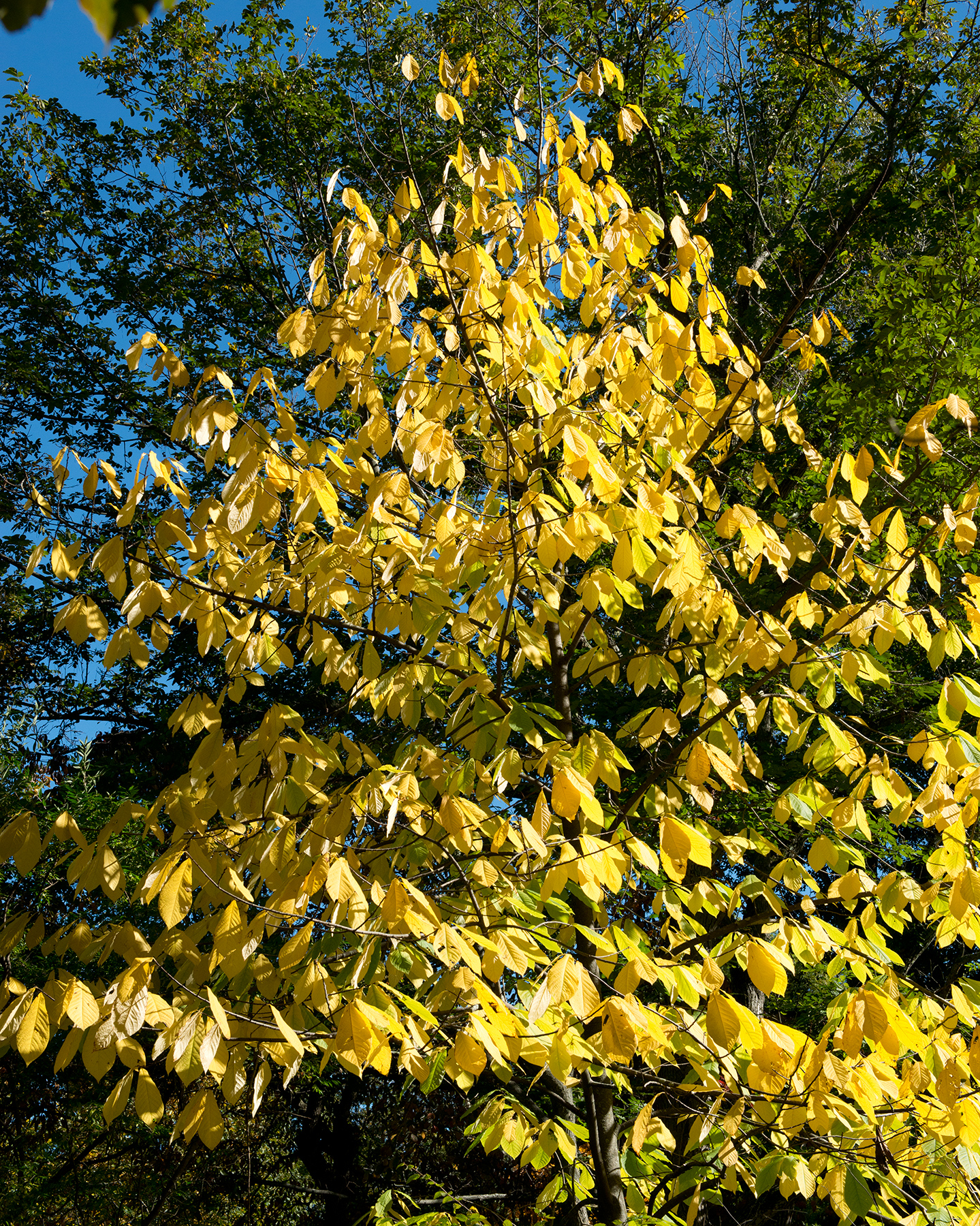 Asimina triloba (Paw Paw)